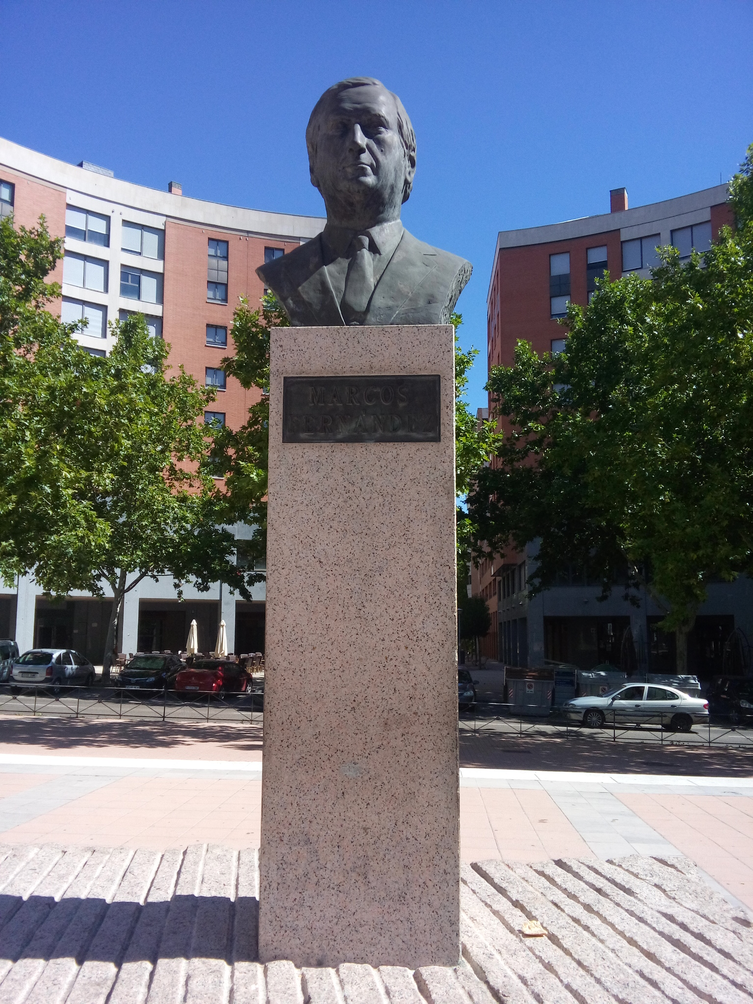 Empresario, constructor y dirigente deportivo español.